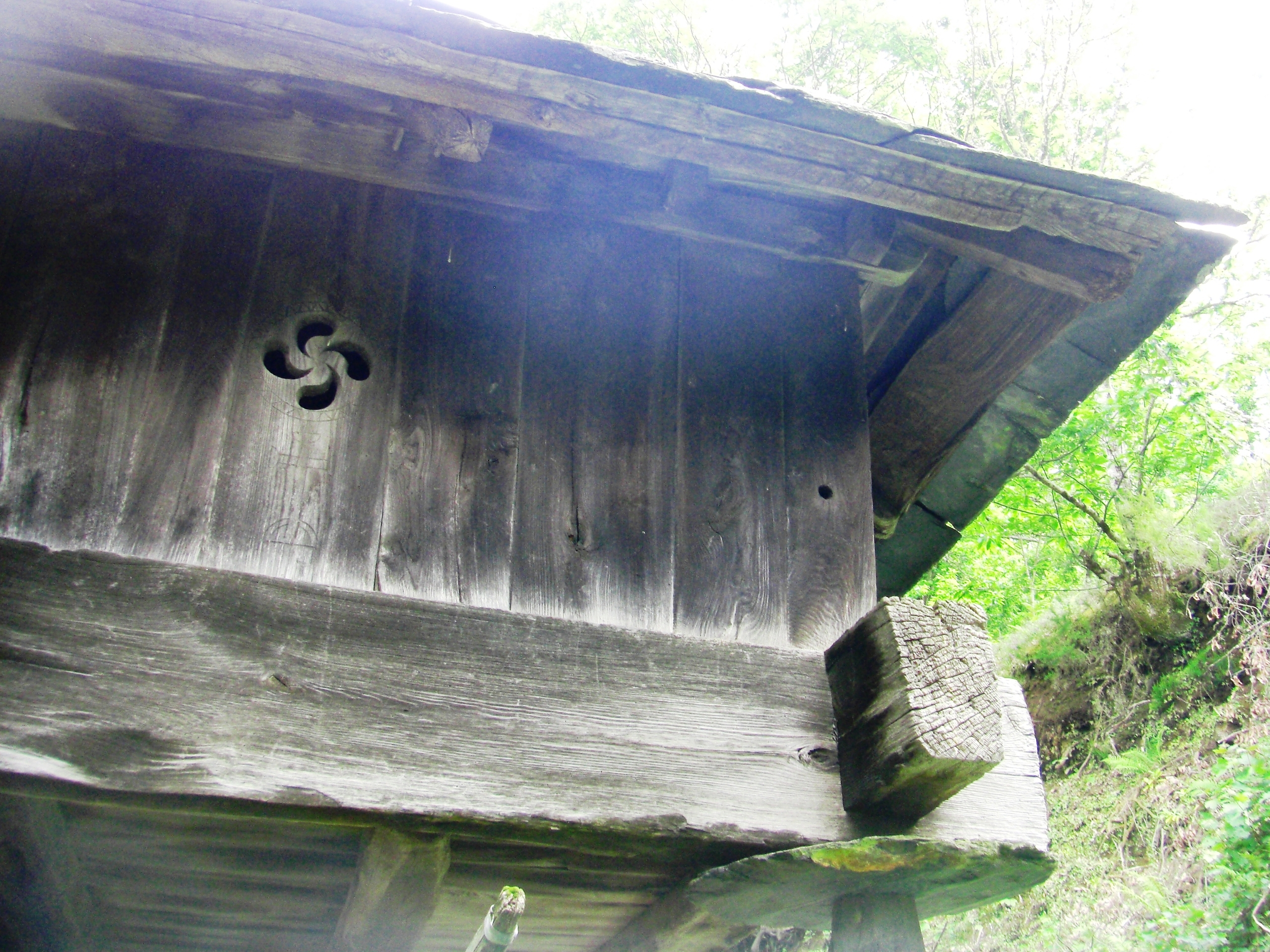 Tetrasquel recortado en la madera de un horreo